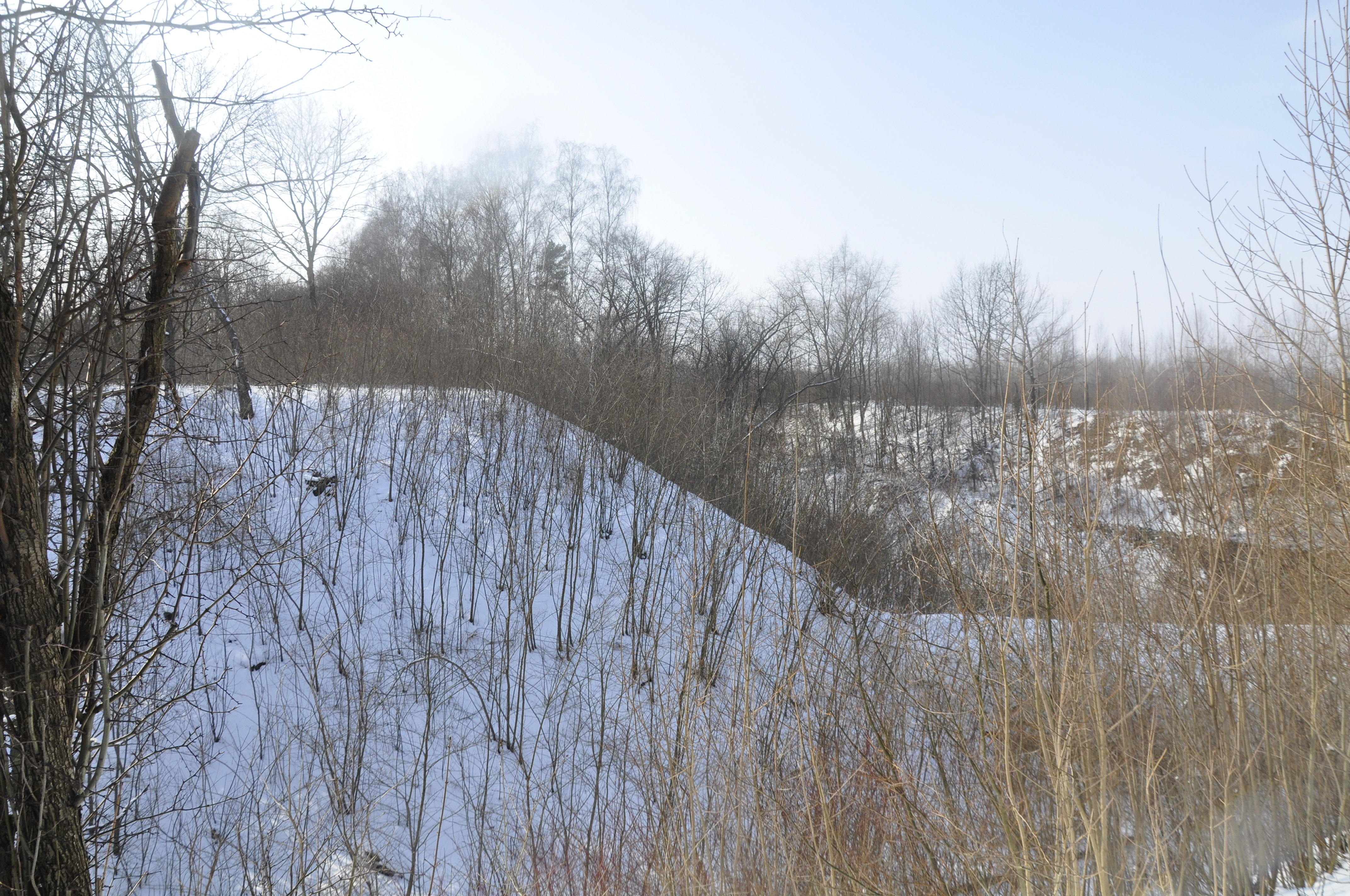 Blick vom Norden auf den Innenbereich der grossen Forts in Zegrze